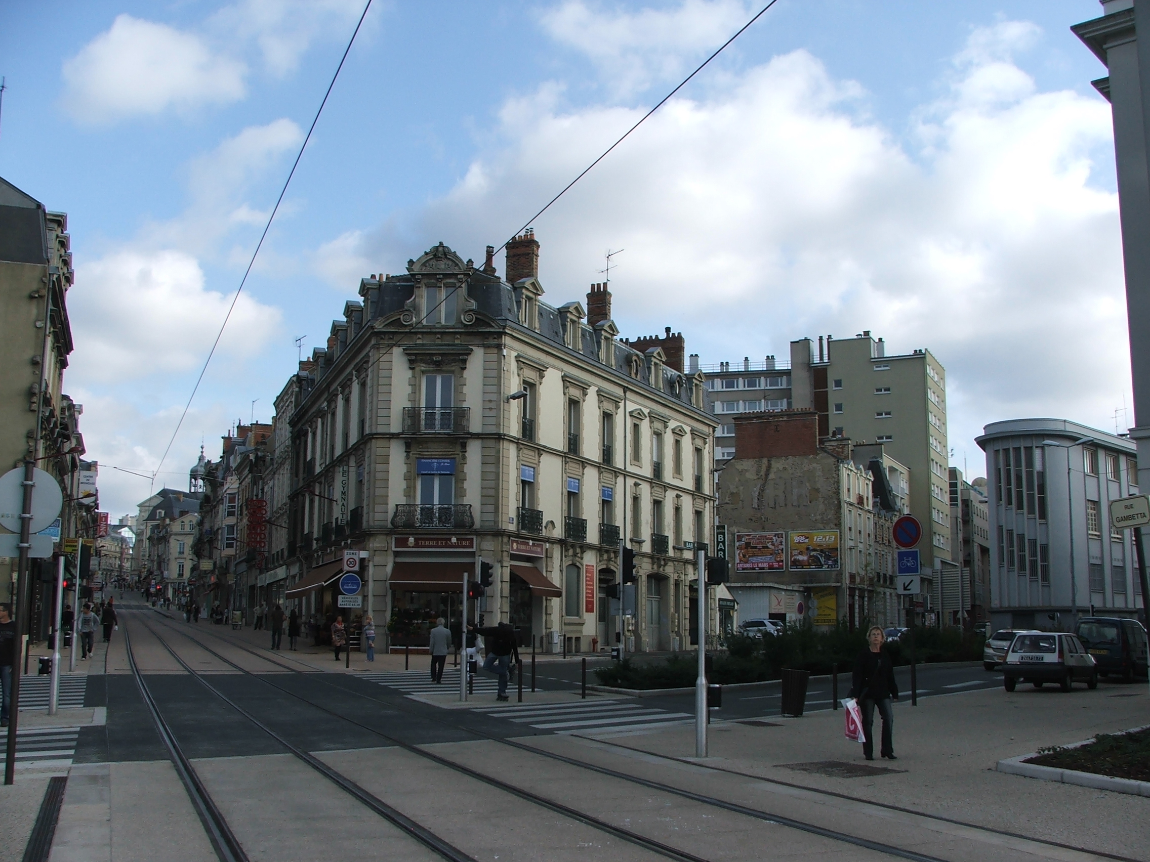 L'îlot des Halles au Mans dans le quartier du même nom.